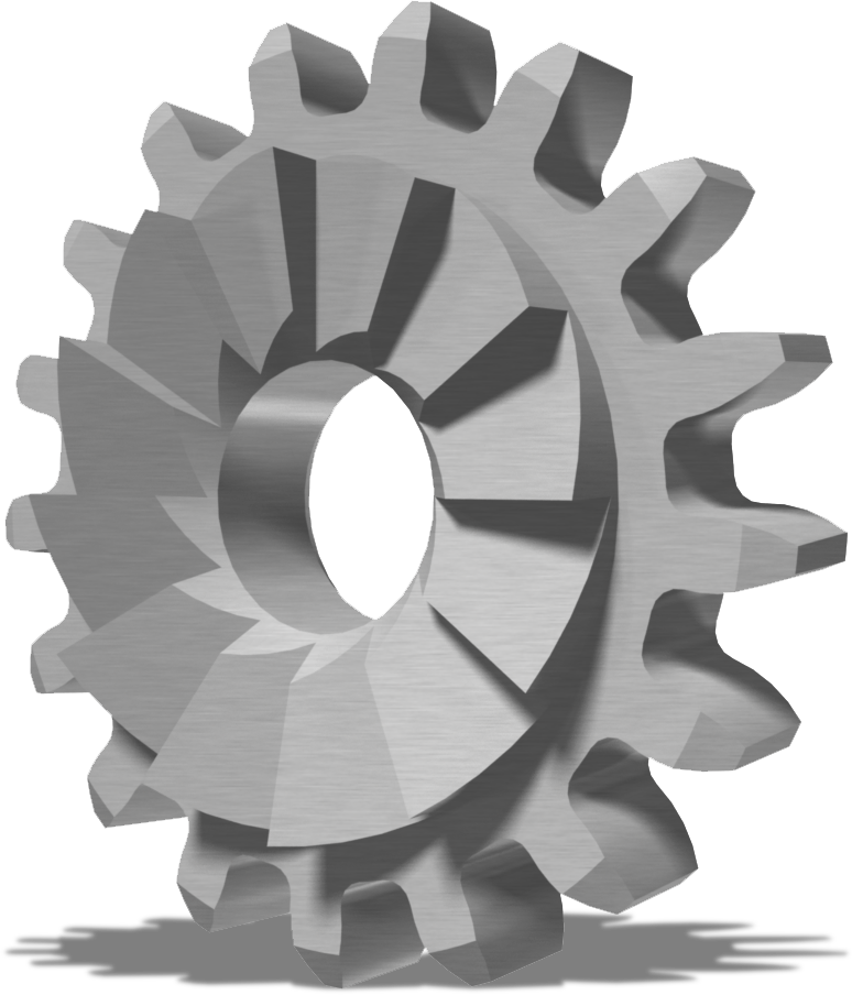 Pignon remontoir, mécanisme horloger permettant d'armer ou de remonter le poids de l'horloger afin de régler l'heure, et la date. Il est complémentaire du pignon coulant